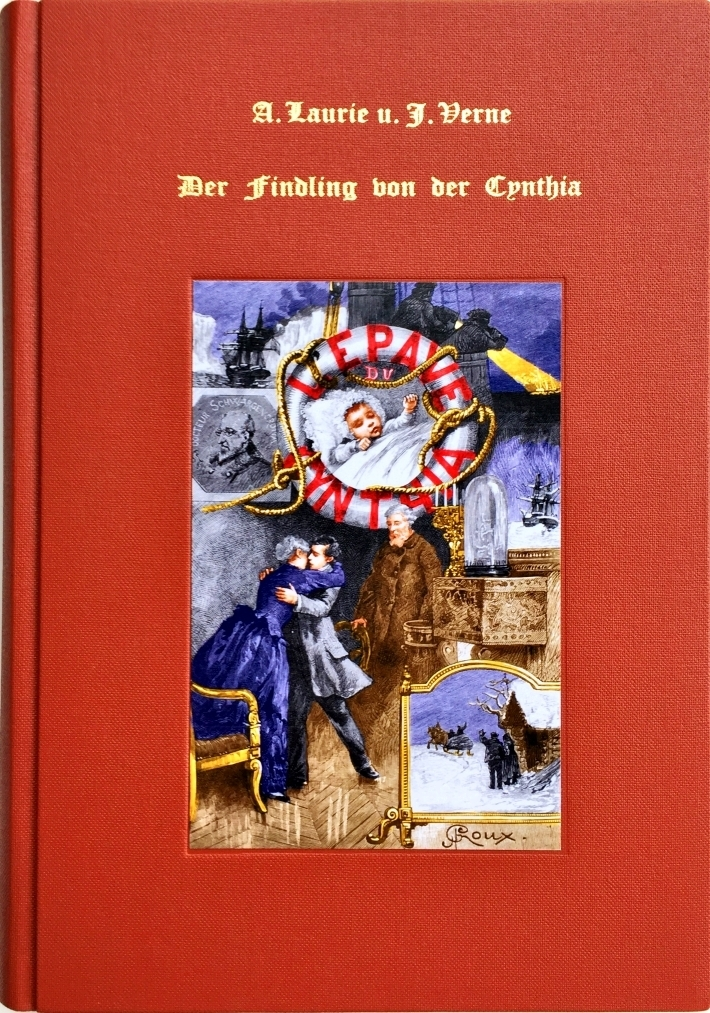 Paschal Grousset (und in geringem Umfang Jules Verne): Der Findling von der Cynthia, 2017 vom Jules-Verne-Club veröffentlicht. Der Roman erschien 1885 unter dem Pseudonym André Laurie.